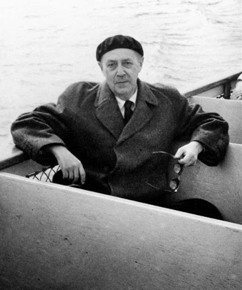 Sándor Márai i els seus germans Géza, Gabor i la seva germana Kató